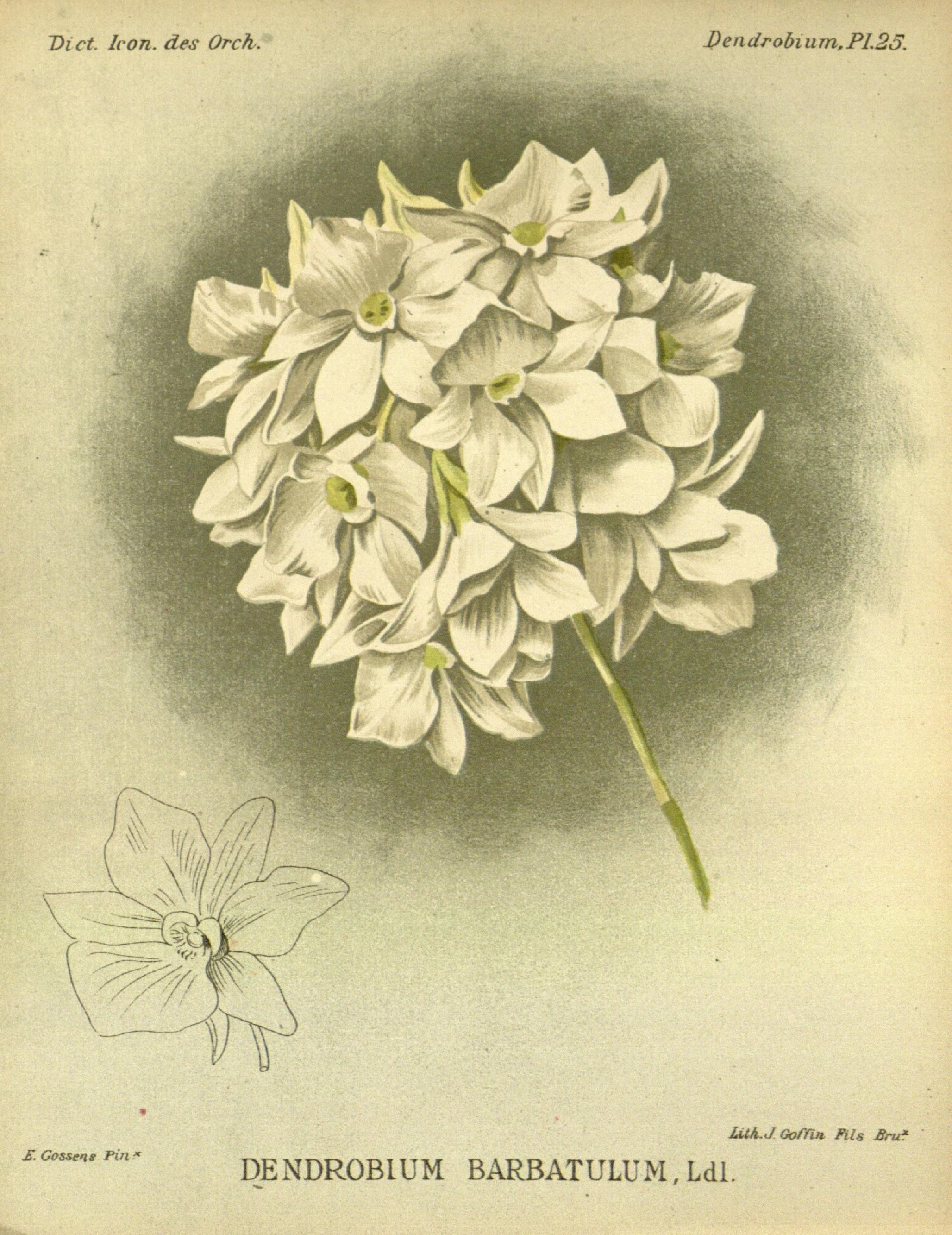 Dictionnaire iconographique des orchidees :. Bruxelles :Imp. F. Havermans, 1896-1907..